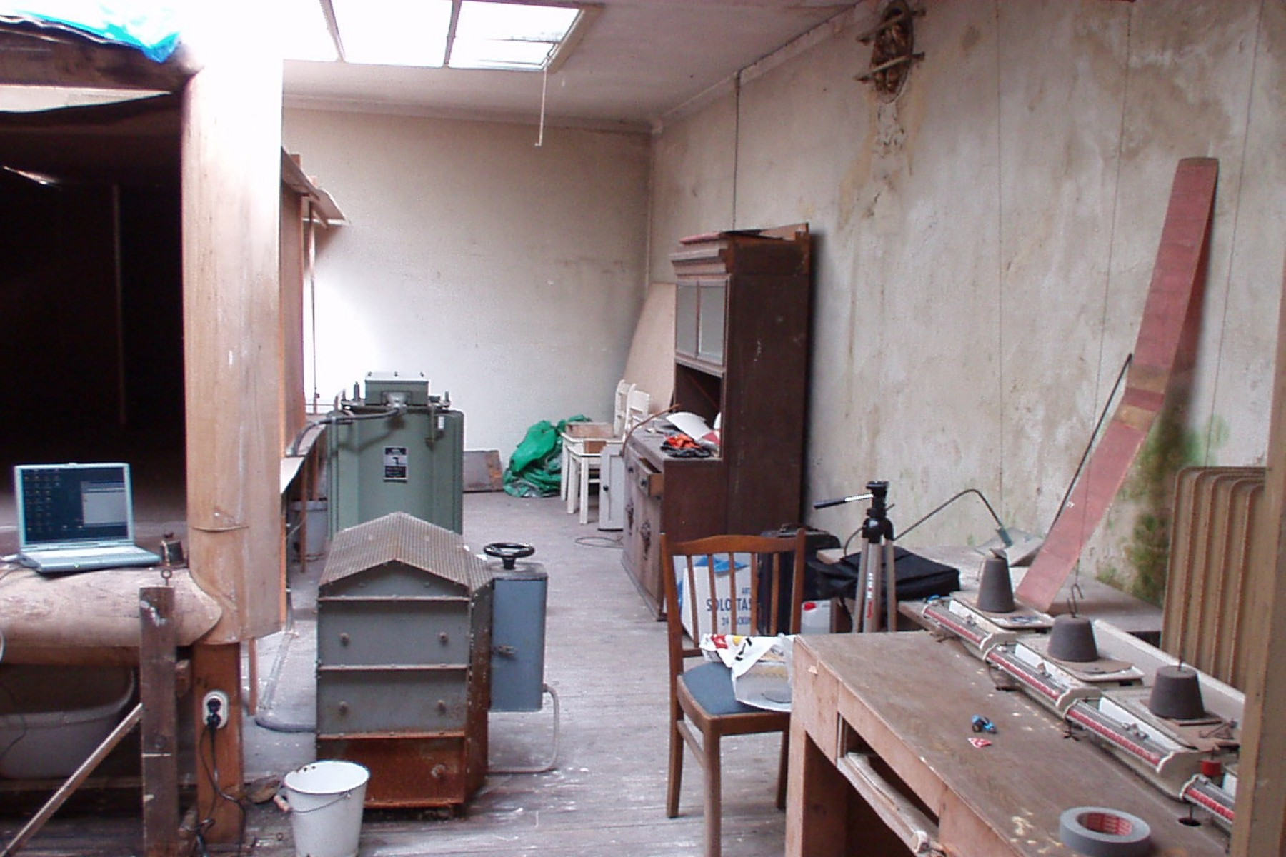 Ein Blick ein die Meßstrecke des Focke Windkanals vor der Renovierung